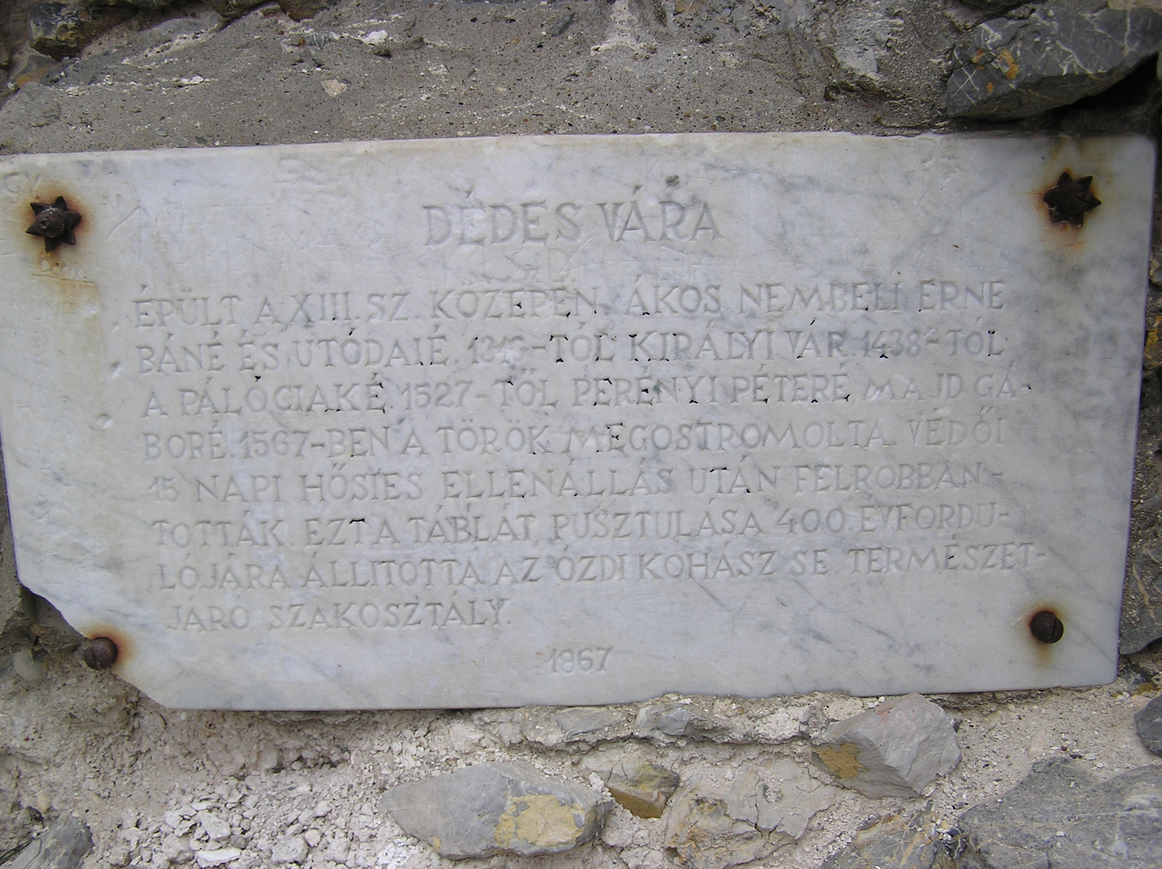 A dédesi várrom emléktáblája 1967-ből